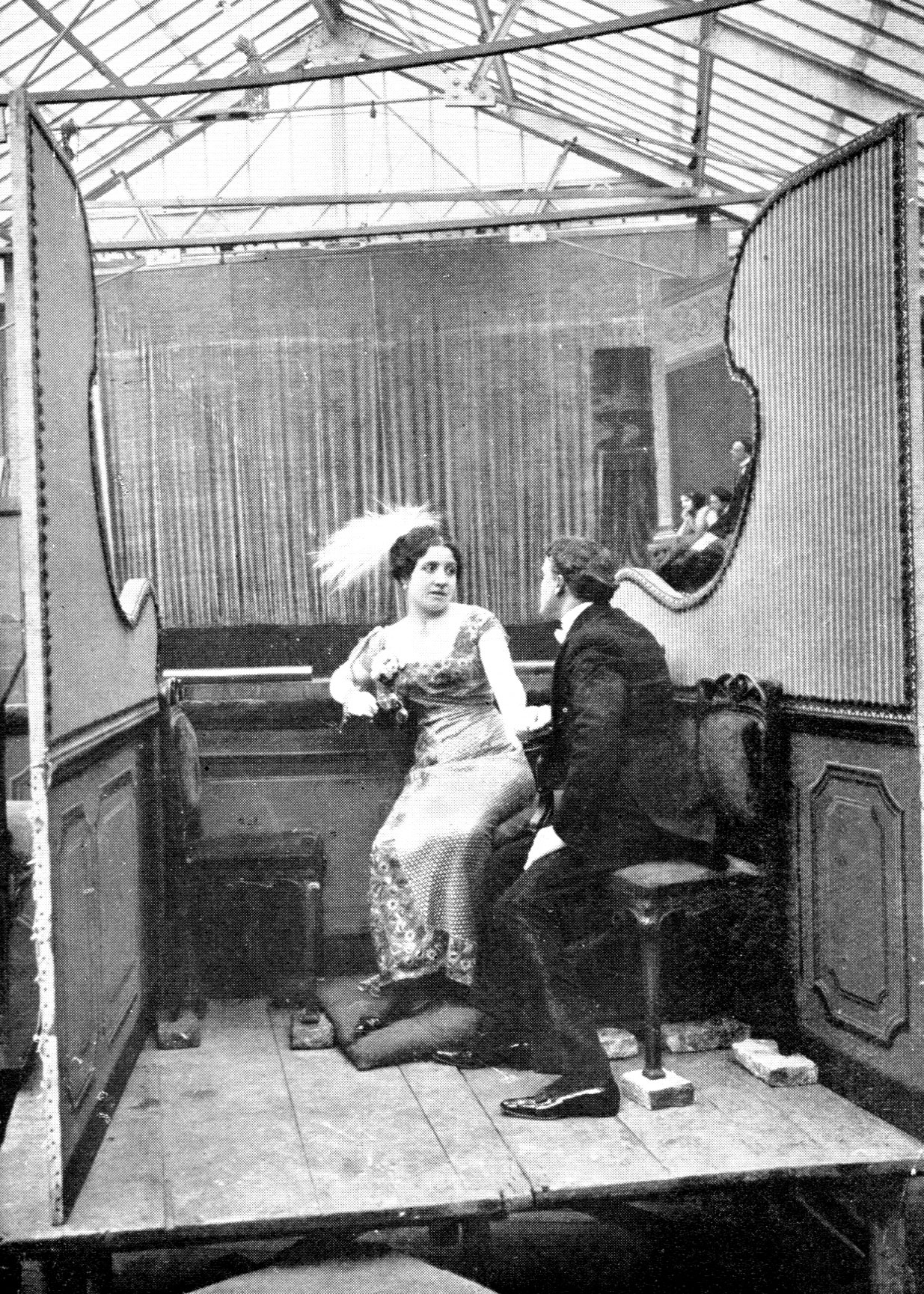 L'adultera, film diretto da Mario Caserini. Prod "Ambrosio", 1911- Foto scena di Maria Gasperini Caserini